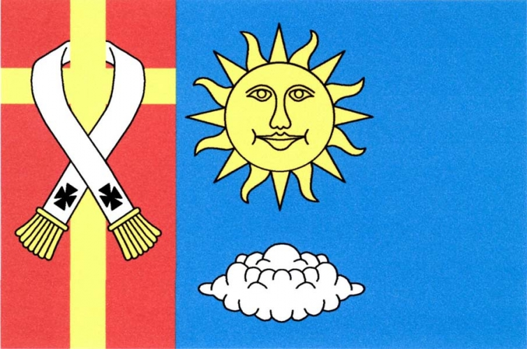 vlajka, Opařany, okres Tábor